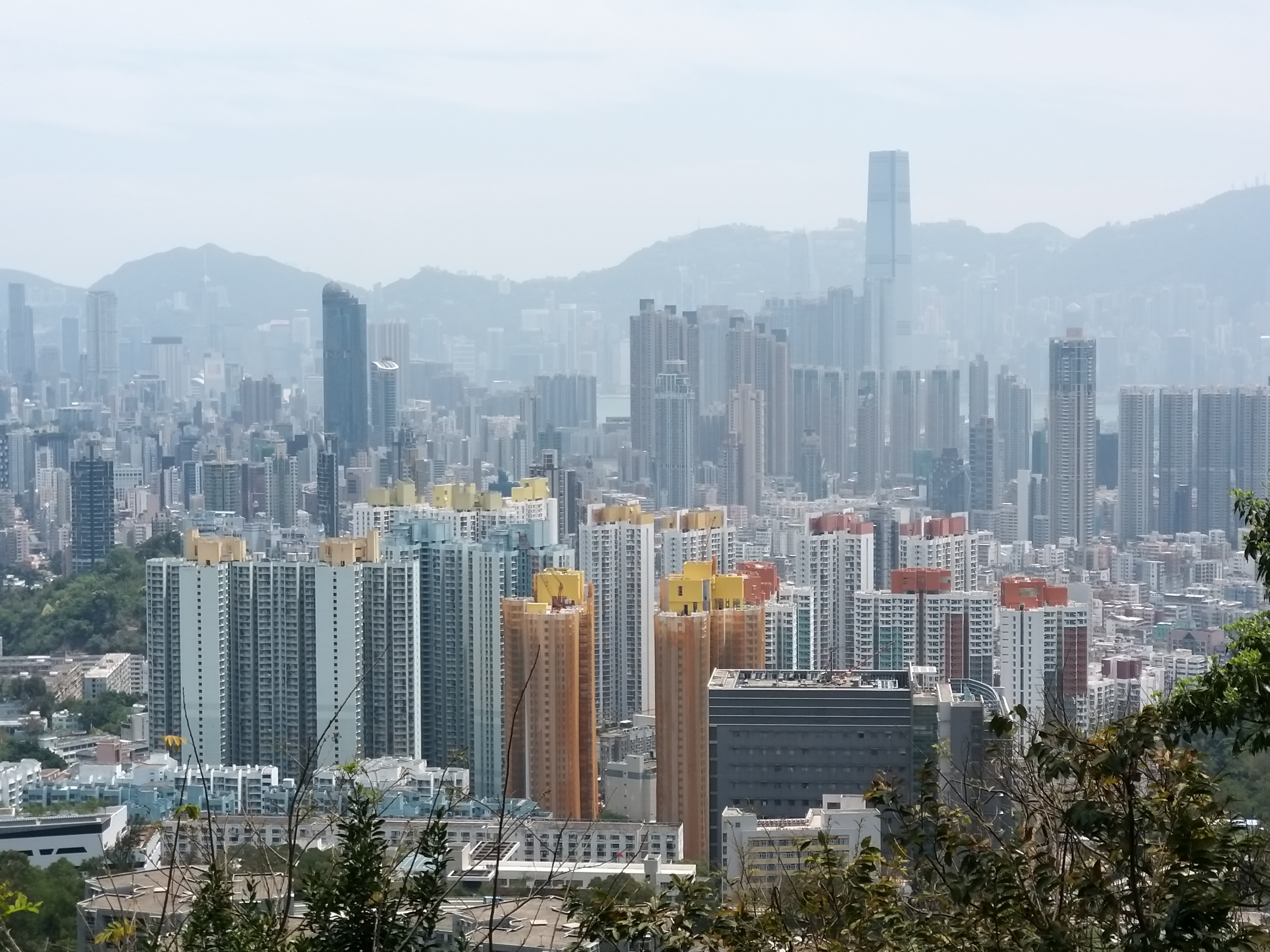 石硤尾公屋的主題顏色-藍、白、橙